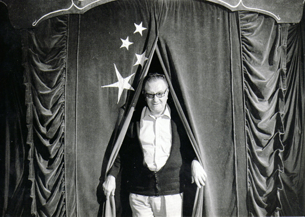 Joan Brossa sobre un escenari a la 2a Fira de Teatre de Tàrrega Format: digitalització fotografia blanc i negre